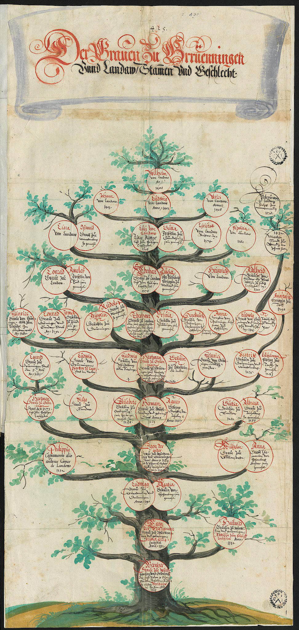 Nachfahrentafeln zur Geschichte des Hauses Württemberg, [Schorndorf], 1591; UB Tübingen, Mh 6,2 Tafel 1: Grafen zu Grüningen und Landau